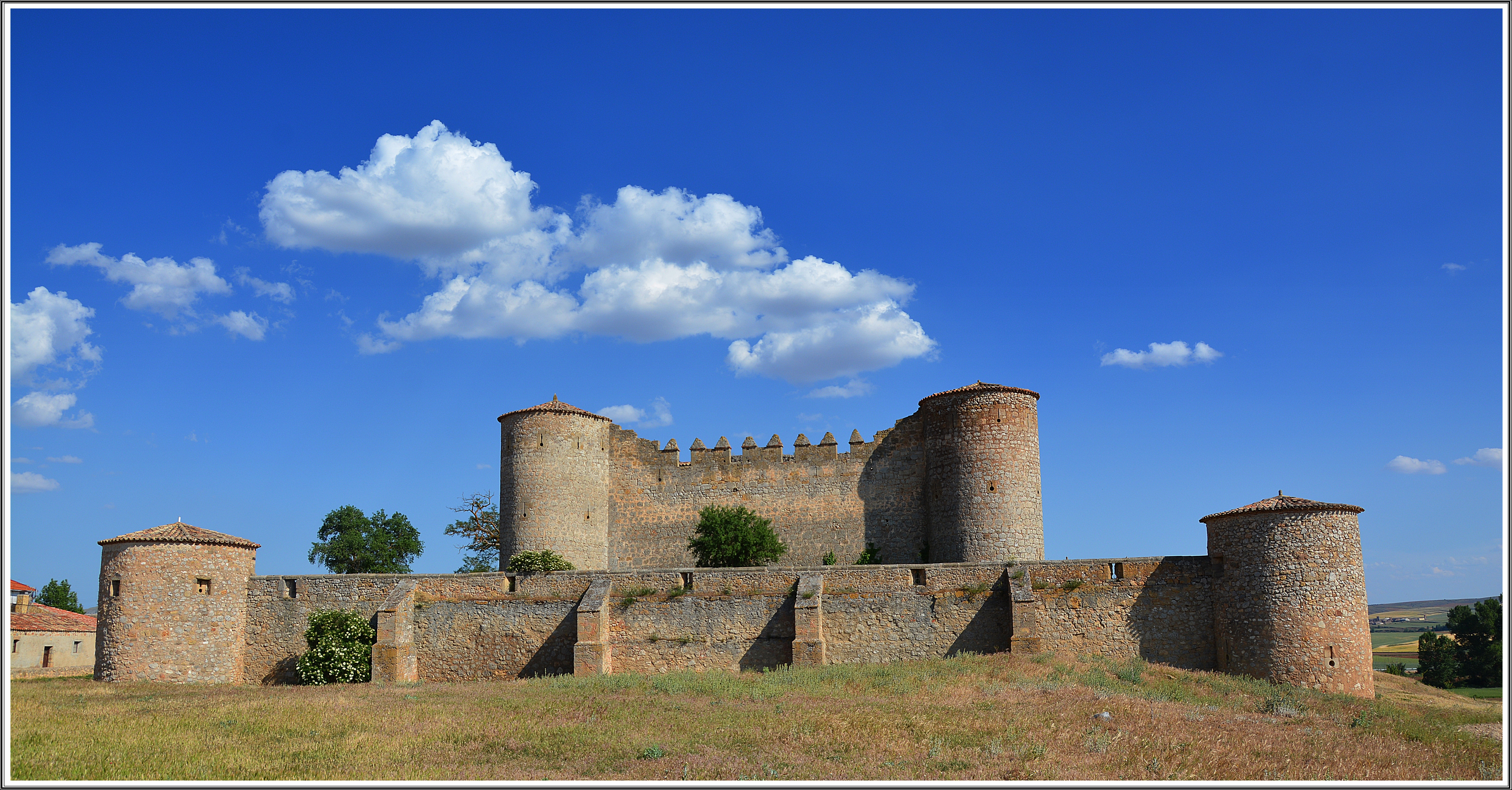 Castillo de Almenar de Soria.